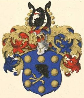 Staali suguvõsa aadlivapp